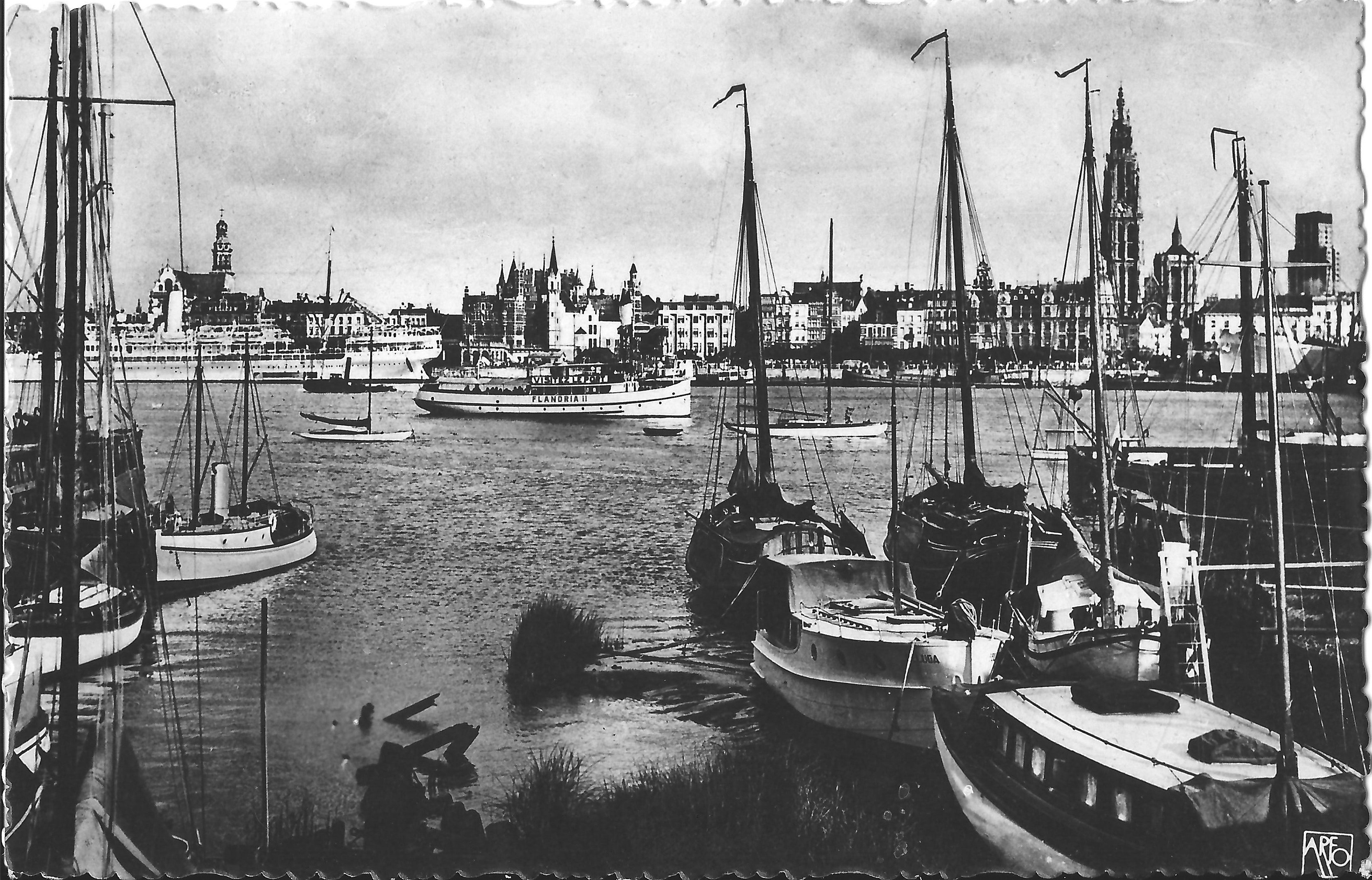 Zicht op de Antwerpse kade vanuit de Linkeroever. De Boerentoren (gebouwd 1931) is zichtbaar aan de rechterkant. Flandria boot en lange afstand veerboot bij de kade zichtbaar. Vermoedelijk naar Congo.